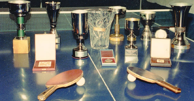 STK Zadrugar Pehari